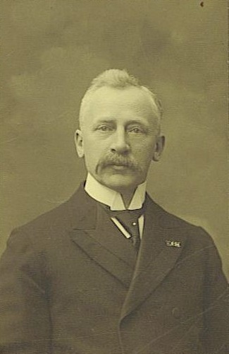 Rienk van Veen (Lemmer, 30 augustus 1865 - Den Haag, 1 mei 1929) was een Nederlands jurist en politicus, eerst voor de (vrije) antirevolutionairen (ARP, daarna VAR), later voor de christelijk-historischen (CHP, daarna CHU).